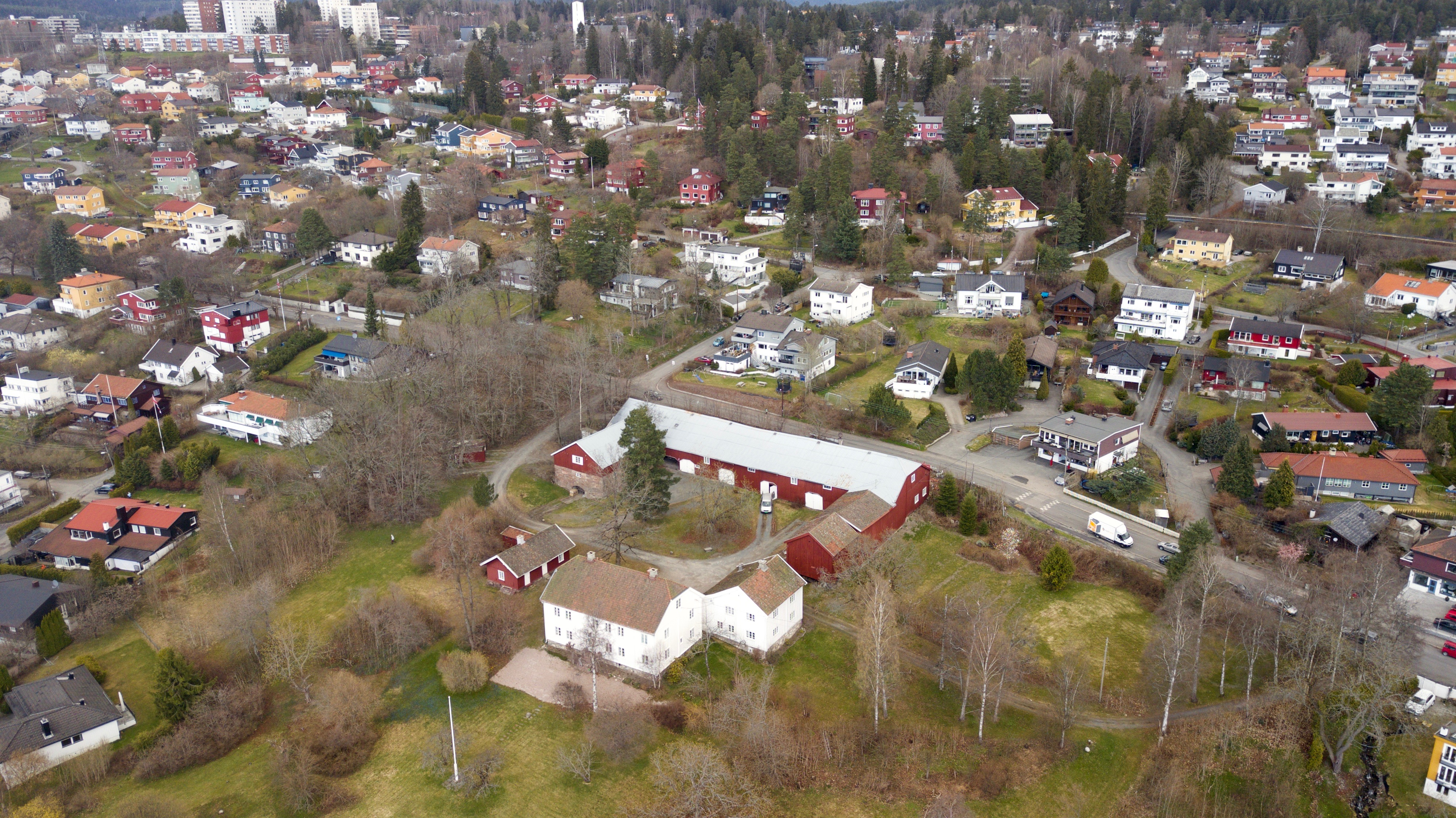 Nordberg gård i Oslo.